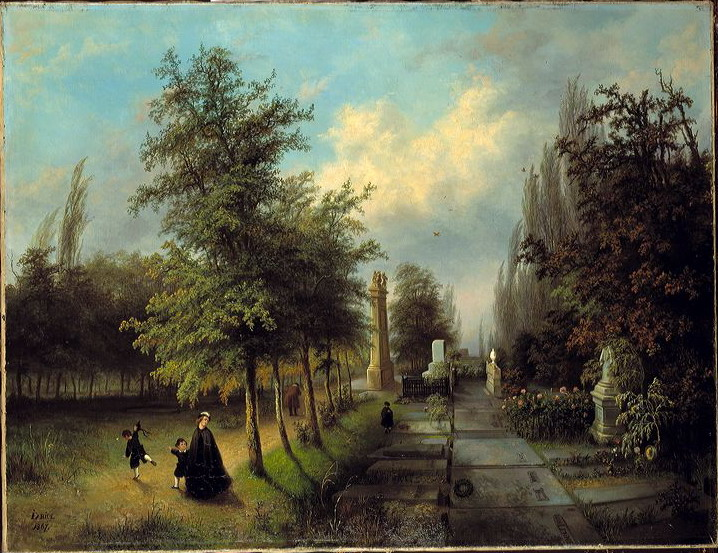 schilderij; begraven; begraafplaats; stadsgezicht; stadsgezicht Amsterdam; begraafplaats; Houtmankade; Westerbegraafplaats; Westzaanstraat